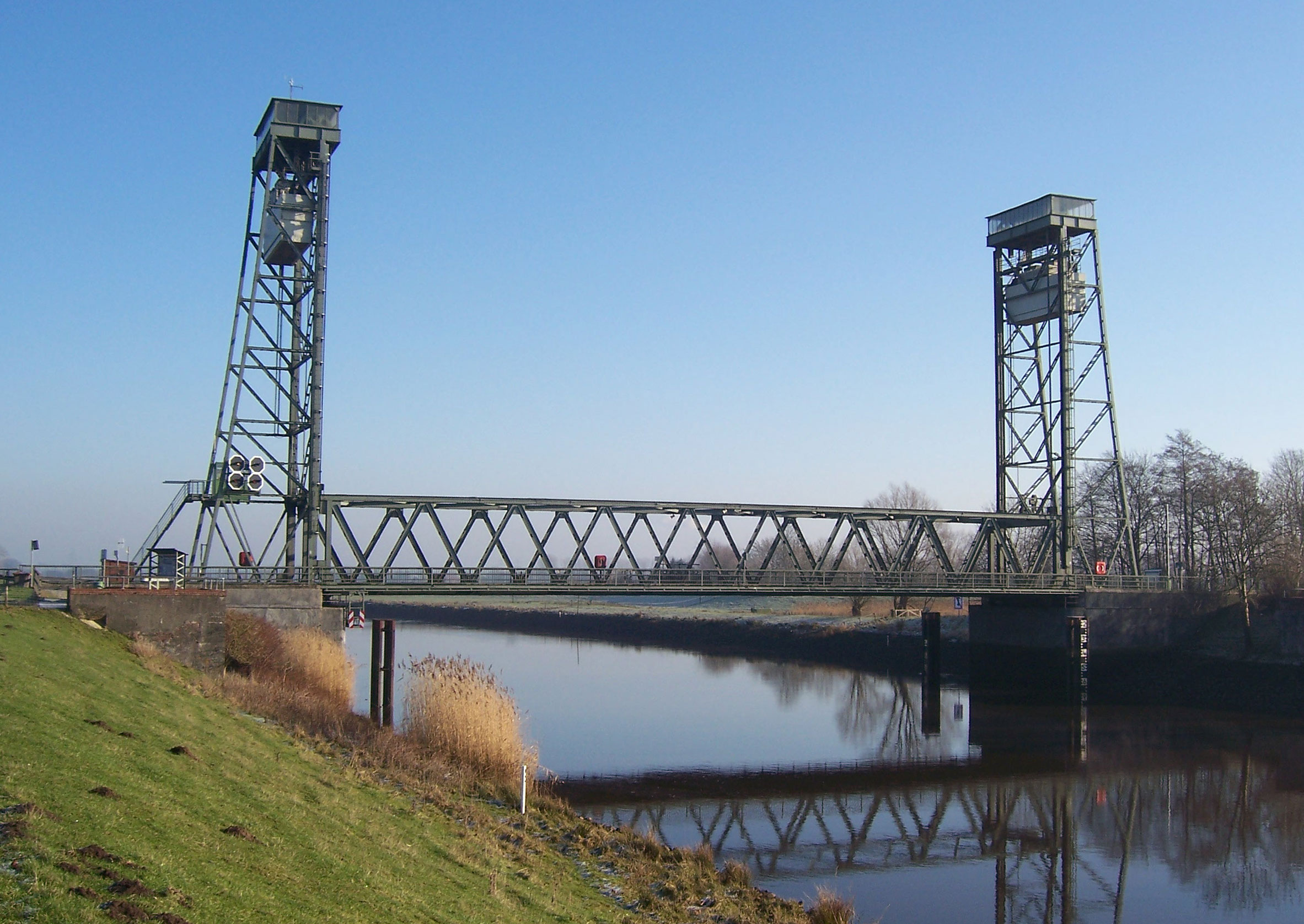 Hubbrücke Huntebrück bei Elsfleth. Die älteste (1953) existierende Hubbrücke in Deutschland; Blick Richtung Osten (flussabwärts)